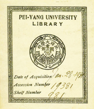 北洋大学校藏书票